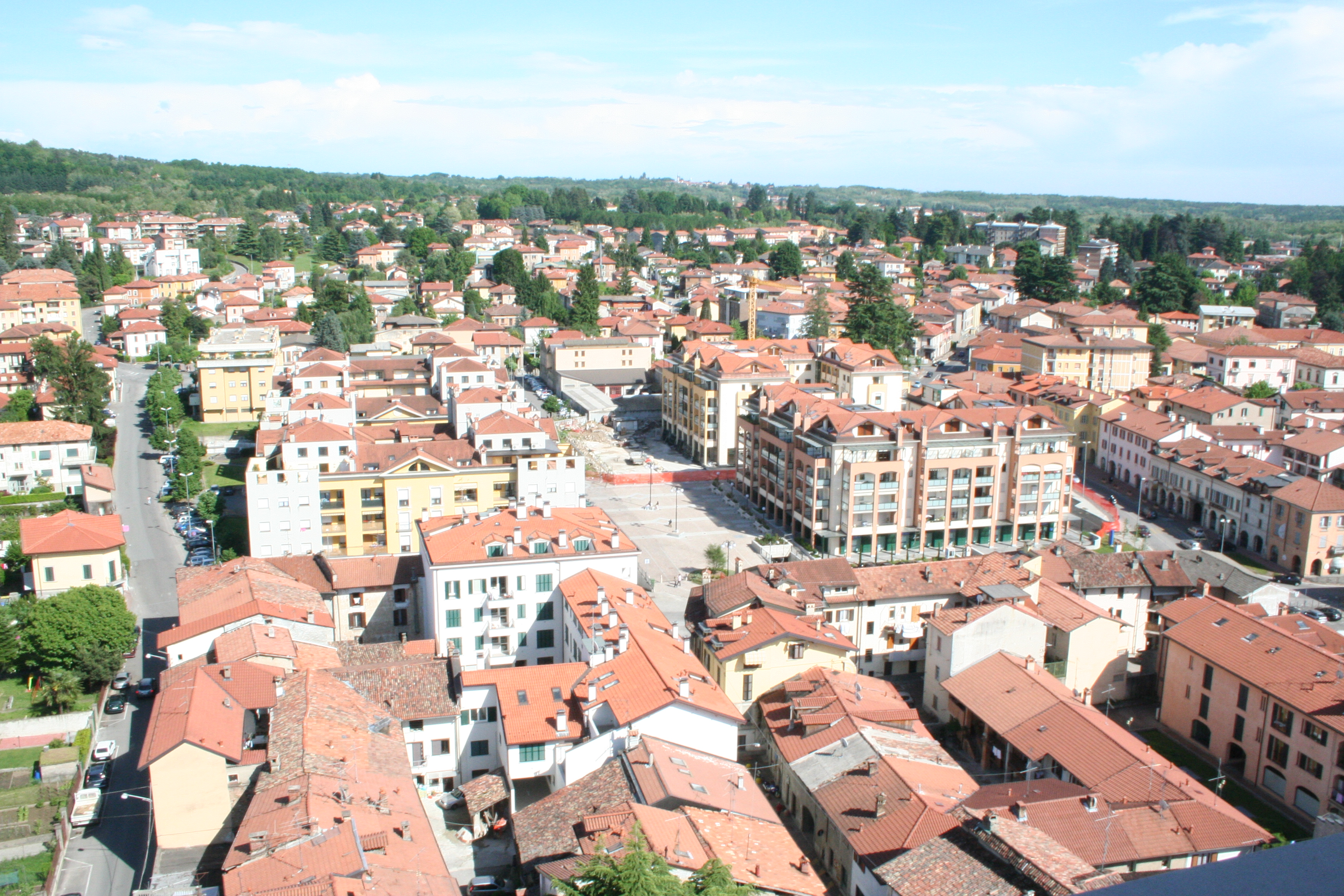 Vista del centro di Malnate dalla cima del campanile della chiesa patronale.